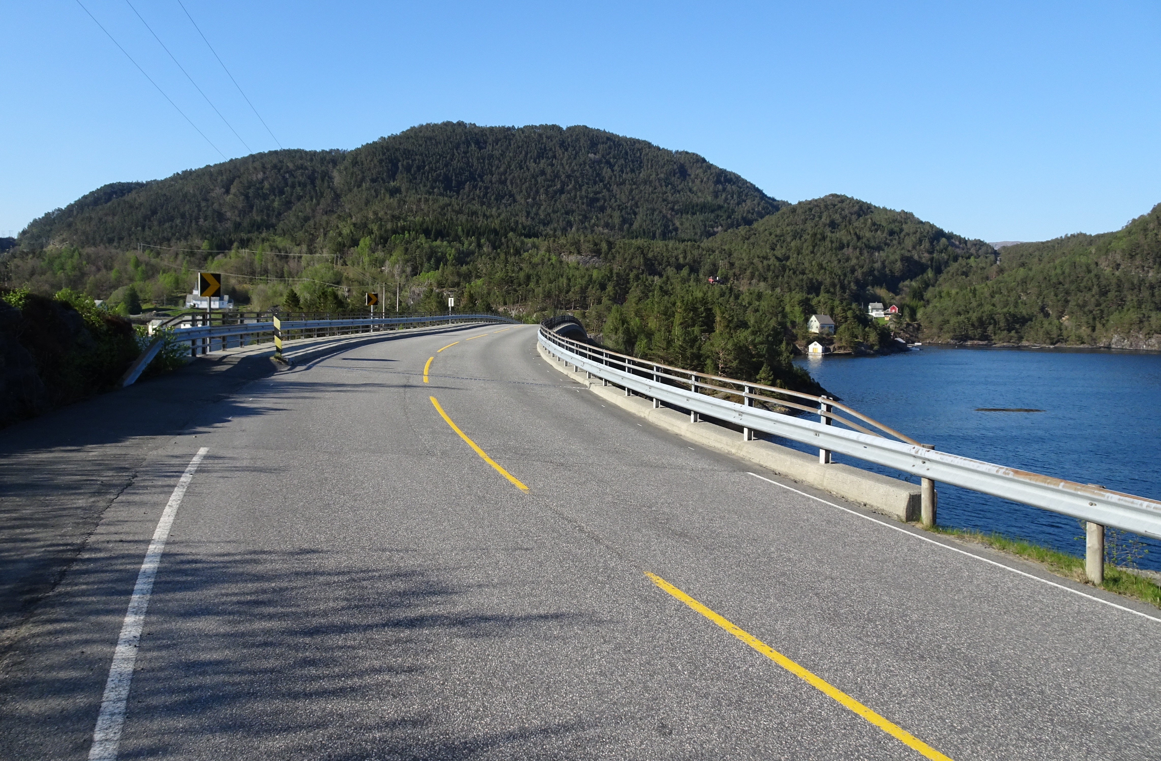 Fylkesvei 549 (tidl. 121) over Grunnasund bru